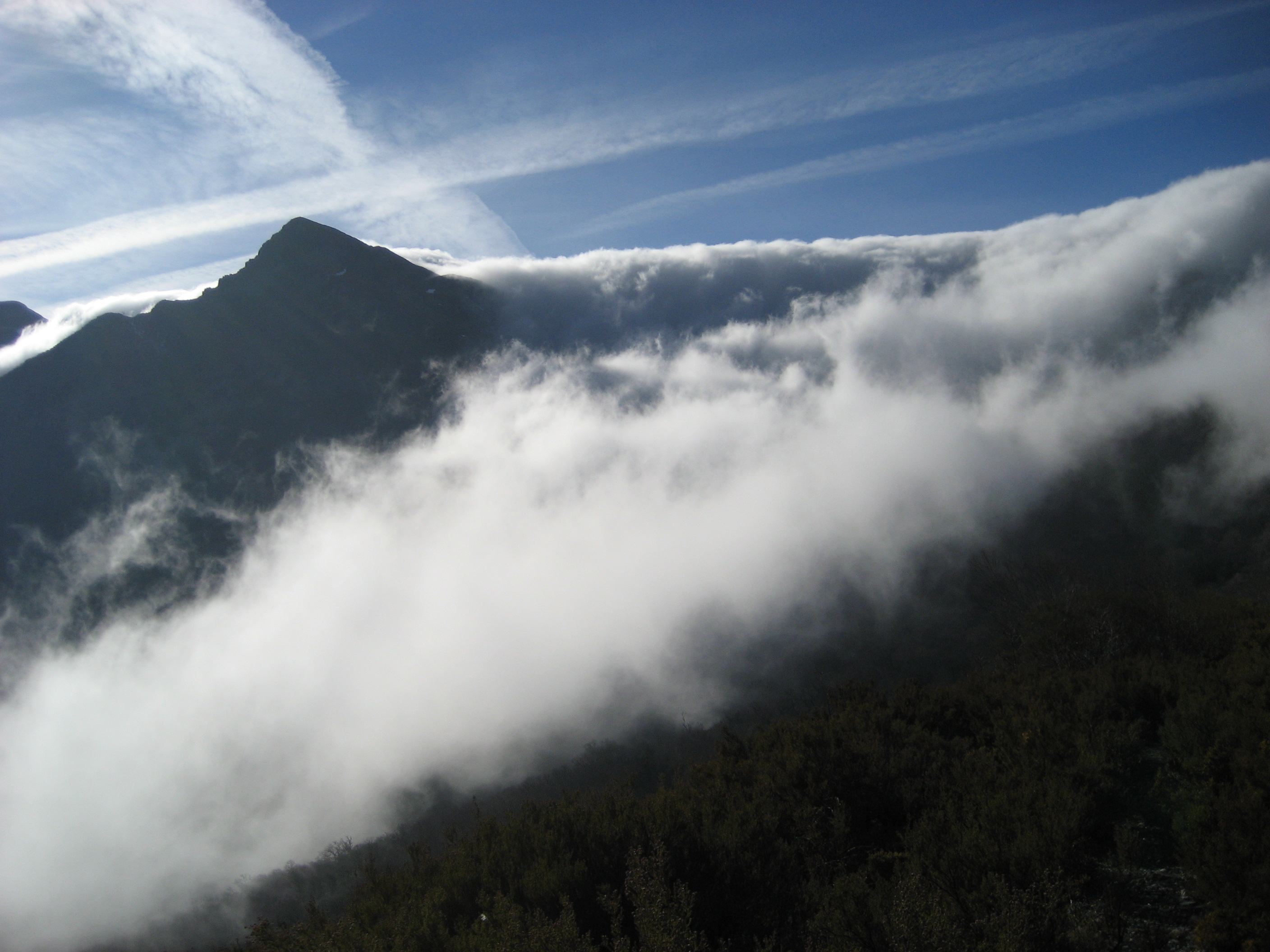 Las nubes procedentes de Galicia chocan con las altas montañas que separan Ancares (León) de Galicia bajando precipitadamente por la ladera de las montañas.